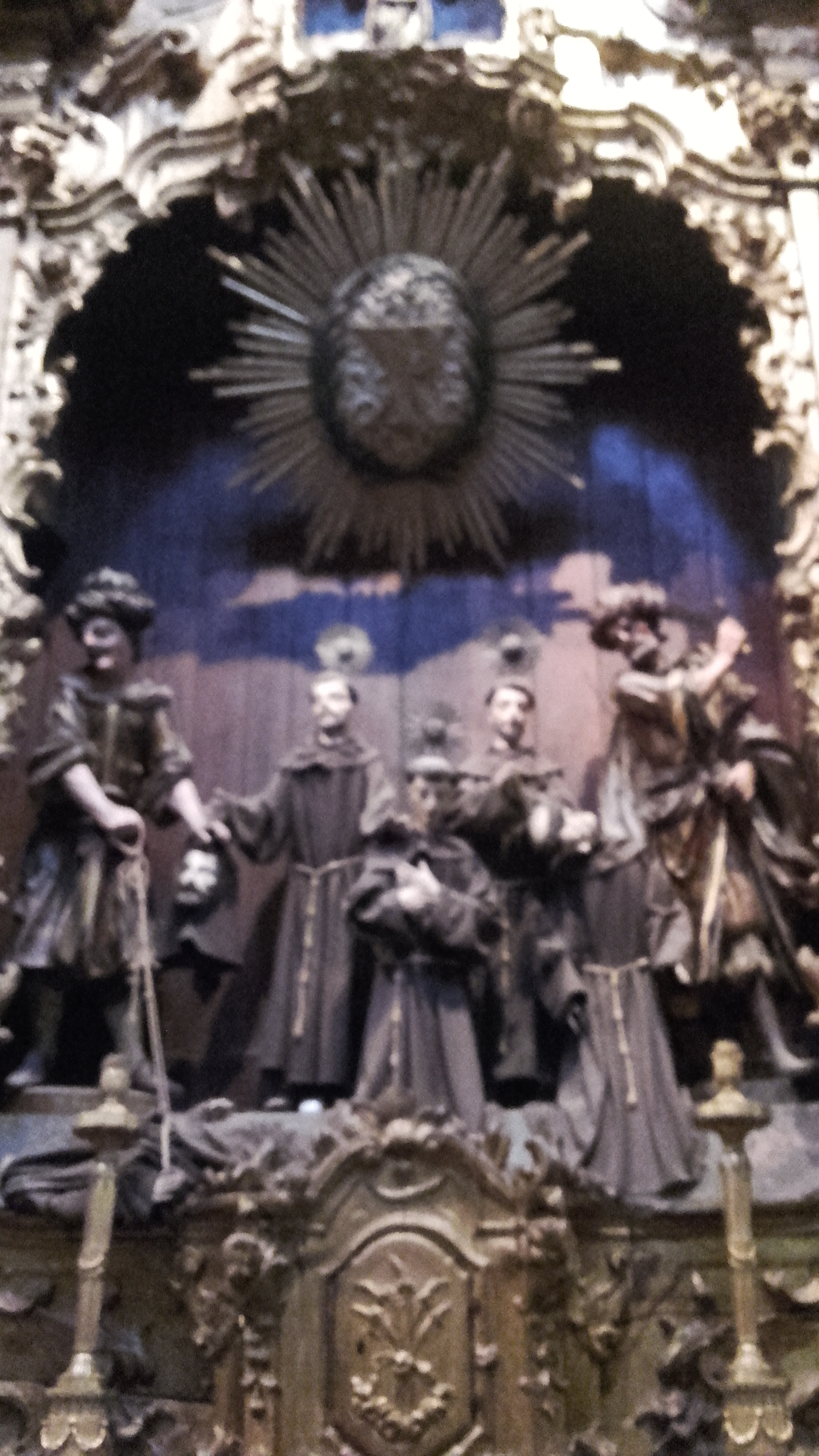 Retablo en la Iglesia de San Francisco de Oporto